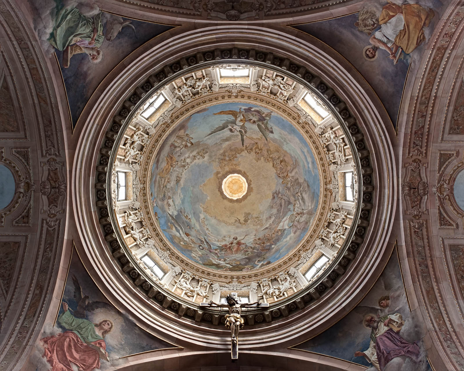 Basilica di San Giovanni Battista This is a photo of a monument which is part of cultural heritage of Italy.